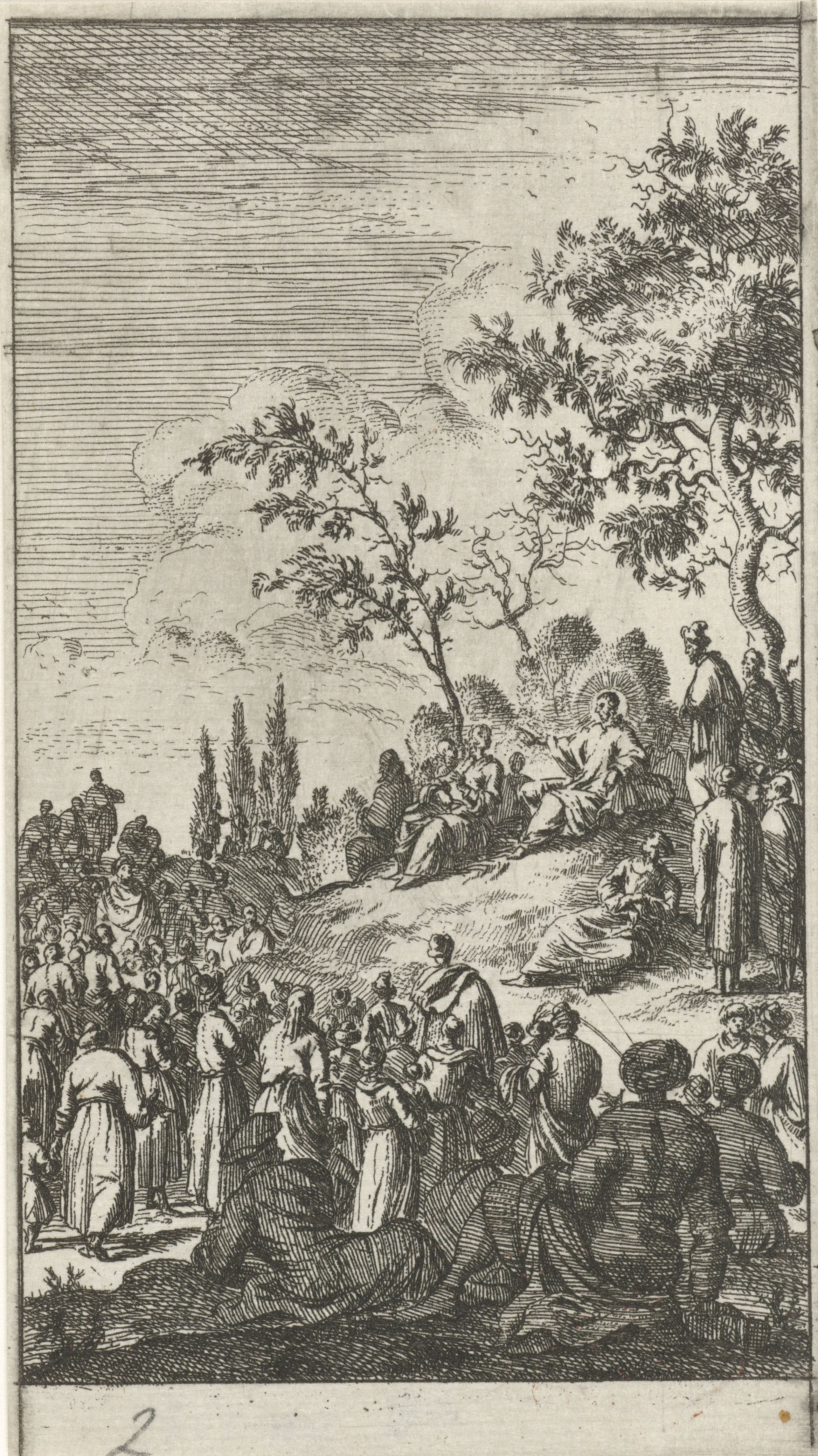 IdentificatieTitel(s): De BergredeVierentwintig scènes uit het Nieuwe Testament (serietitel)Objecttype: prent Objectnummer: RP-P-OB-44.078Catalogusreferentie: Van Eeghen 155Opmerking: kopieOpschriften / Merken: verzamelaarsmerk, verso, gestempeld: Lugt 240nummer, recto, handschrift in potlood: ‘2’VervaardigingVervaardiger: prentmaker: anoniemnaar prent van: Jan LuykenDatering: 1681 - 1762Fysieke kenmerken: ets; proefdrukMateriaal: papier Techniek: etsenAfmetingen: blad: h 123 mm × b 69 mmToelichtingKopie naar prent van J. Luyken, mogelijk voor het eerst verschenen in: Het Nieuwe Testament ofte alle Boecken des Nieuwen Verbondts onses Heeren Iesu Christi. Amsterdam: Hieronymus Sweerts, Jan ten Hoorn, Jan Bouman en Daniel van den Dalen, 1681.OnderwerpWat: 'command these stones to become loaves of bread' ~ temptation of Christ in the wildernessVerwerving en rechtenVerwerving: overdracht van beheer 1816Copyright: Publiek domein